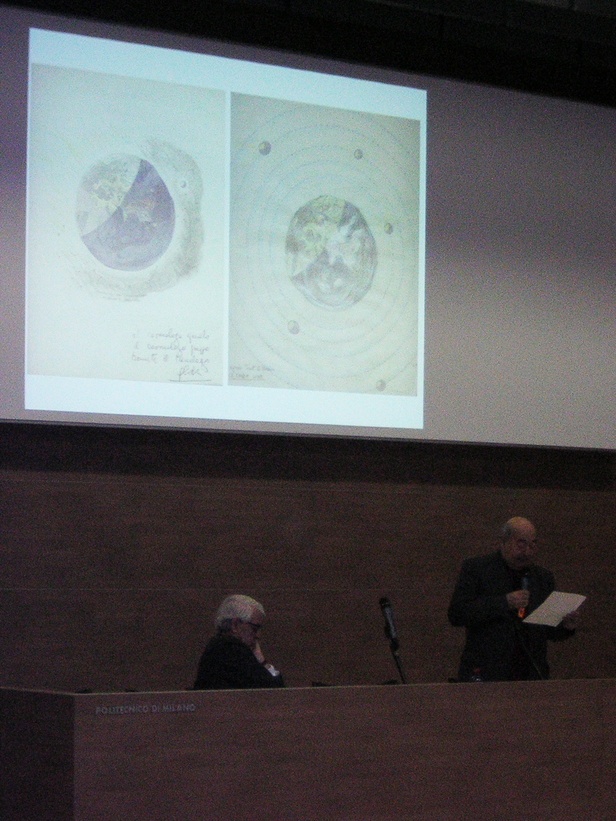 Il prof. Marco Dezzi Bardeschi legge la prolusione dal titolo "Restauro, poco rimane da dire?" all'apertura dell'anno accademico 2005-6 della Facoltà di Architettura Civile del Politecnico di Milano - Bovisa